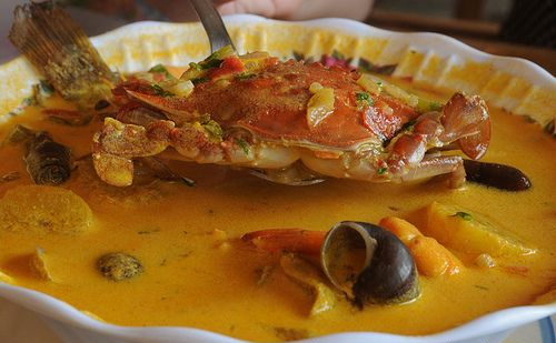 Tapado de Livingston